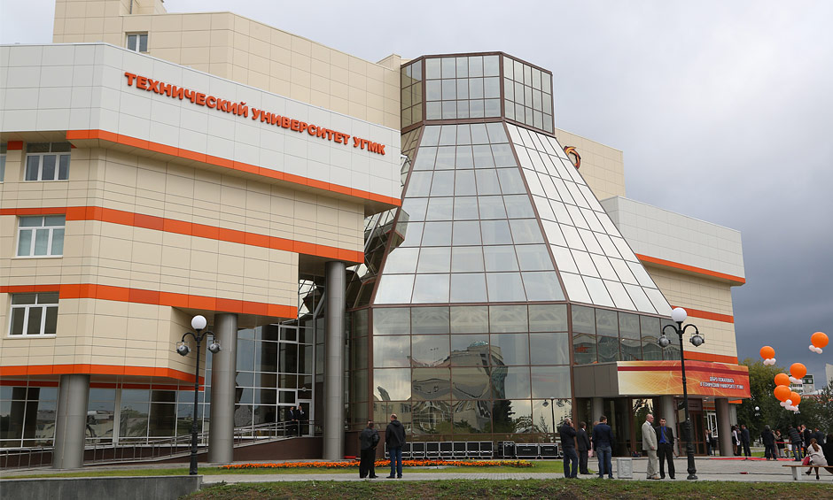 Здание НЧОУ ВО «Технический университет УГМК»